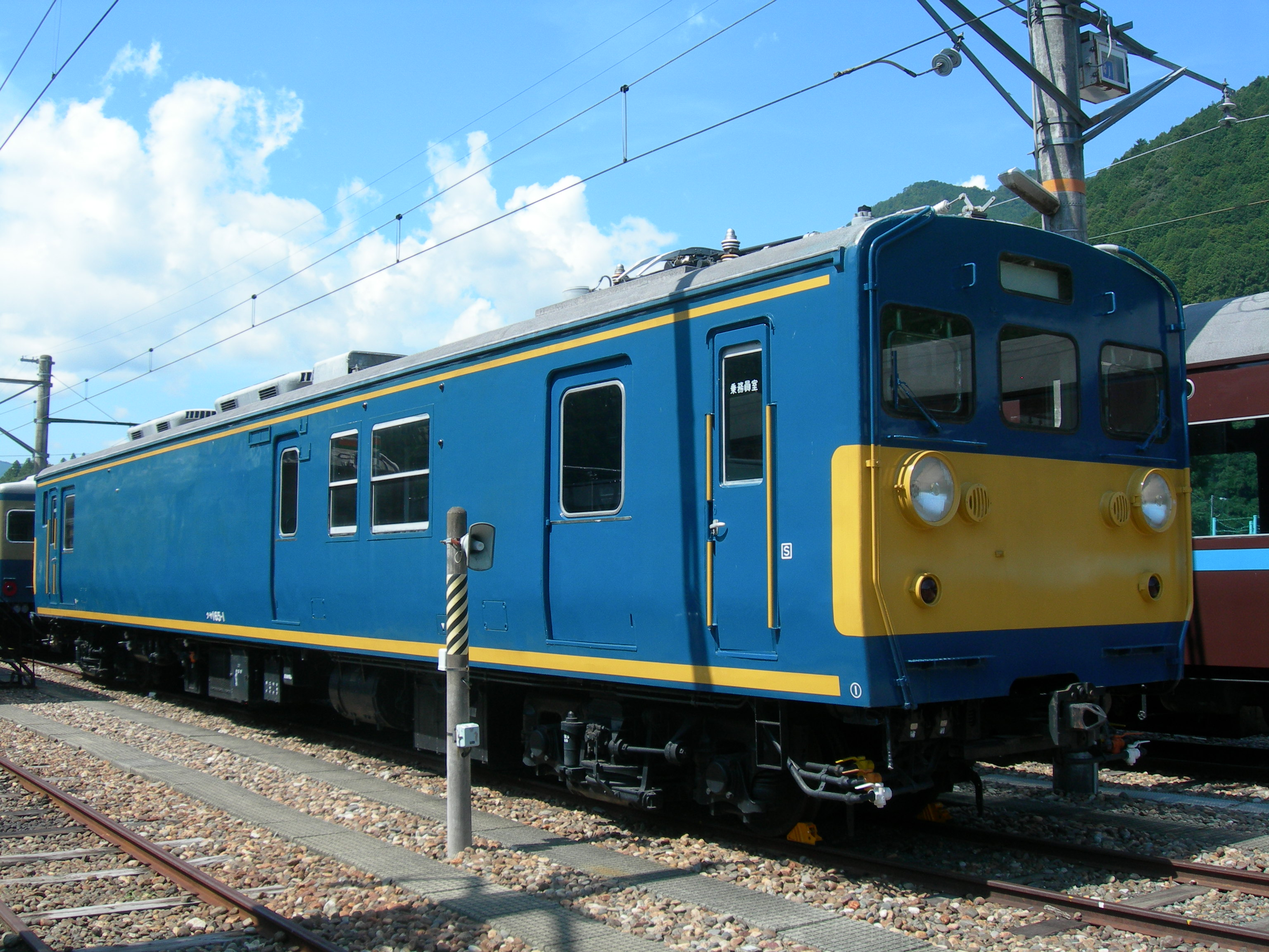 クヤ165形教習車